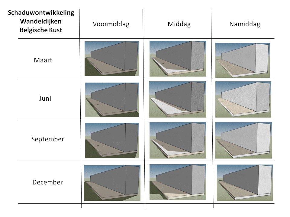 Schaduwontwikkelijk op wandeldijk bij lineaire bebouwing, Belgische Kust